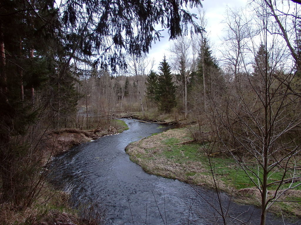 Rivière Slocene près du lac Valgums en Lettonie.